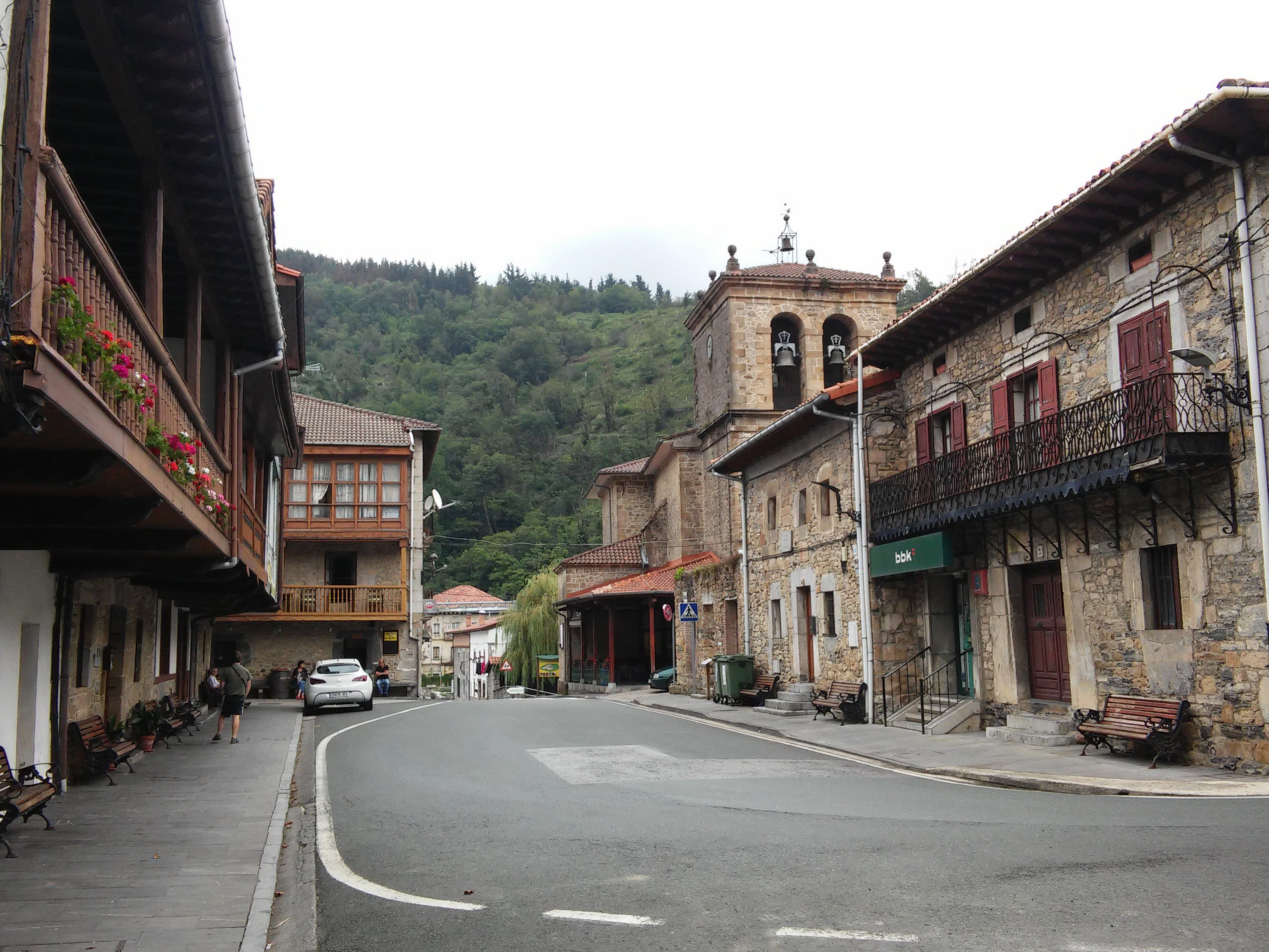 Lanestosako kale nagusia